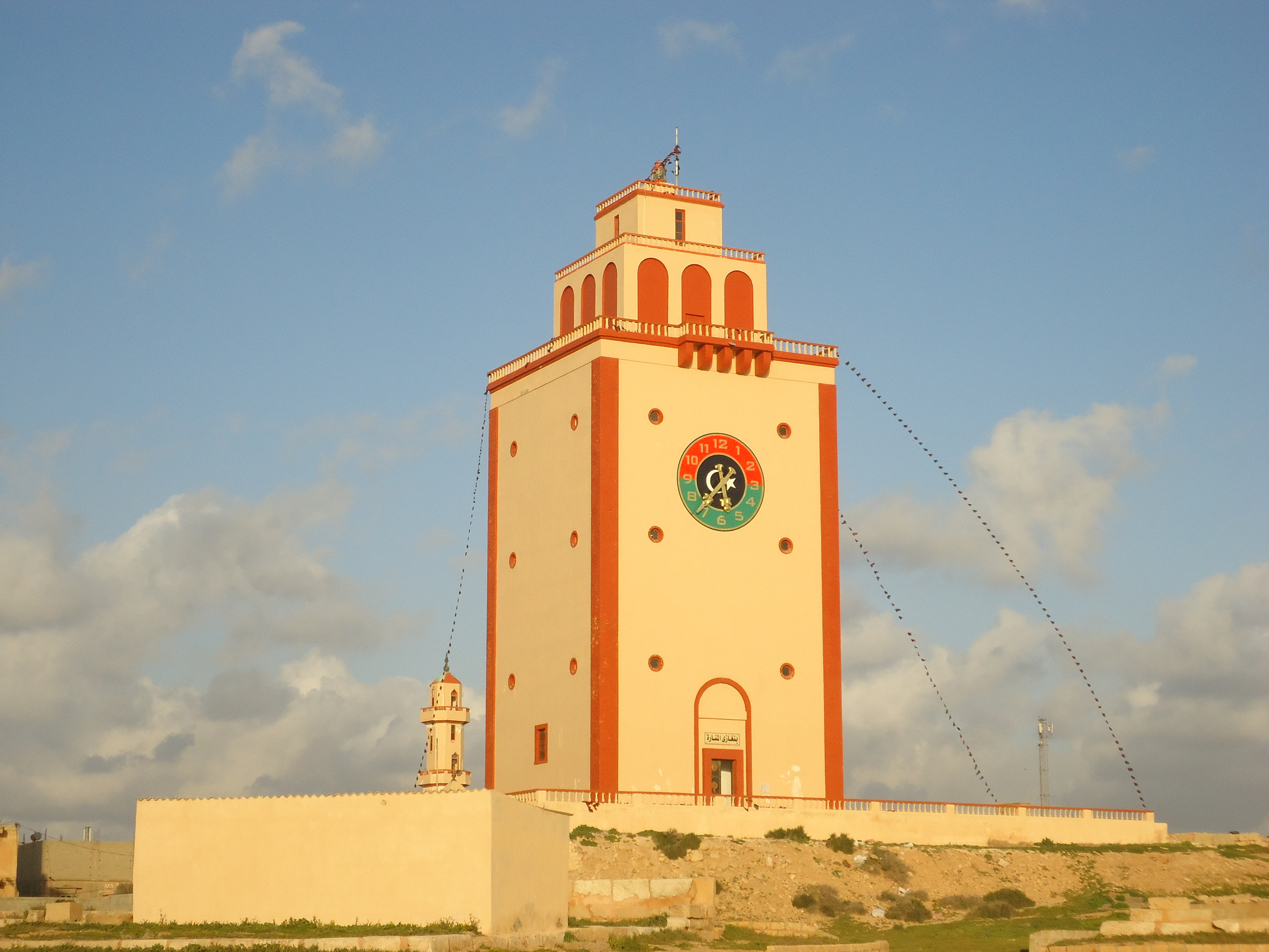 منارة سيدي خريبيش